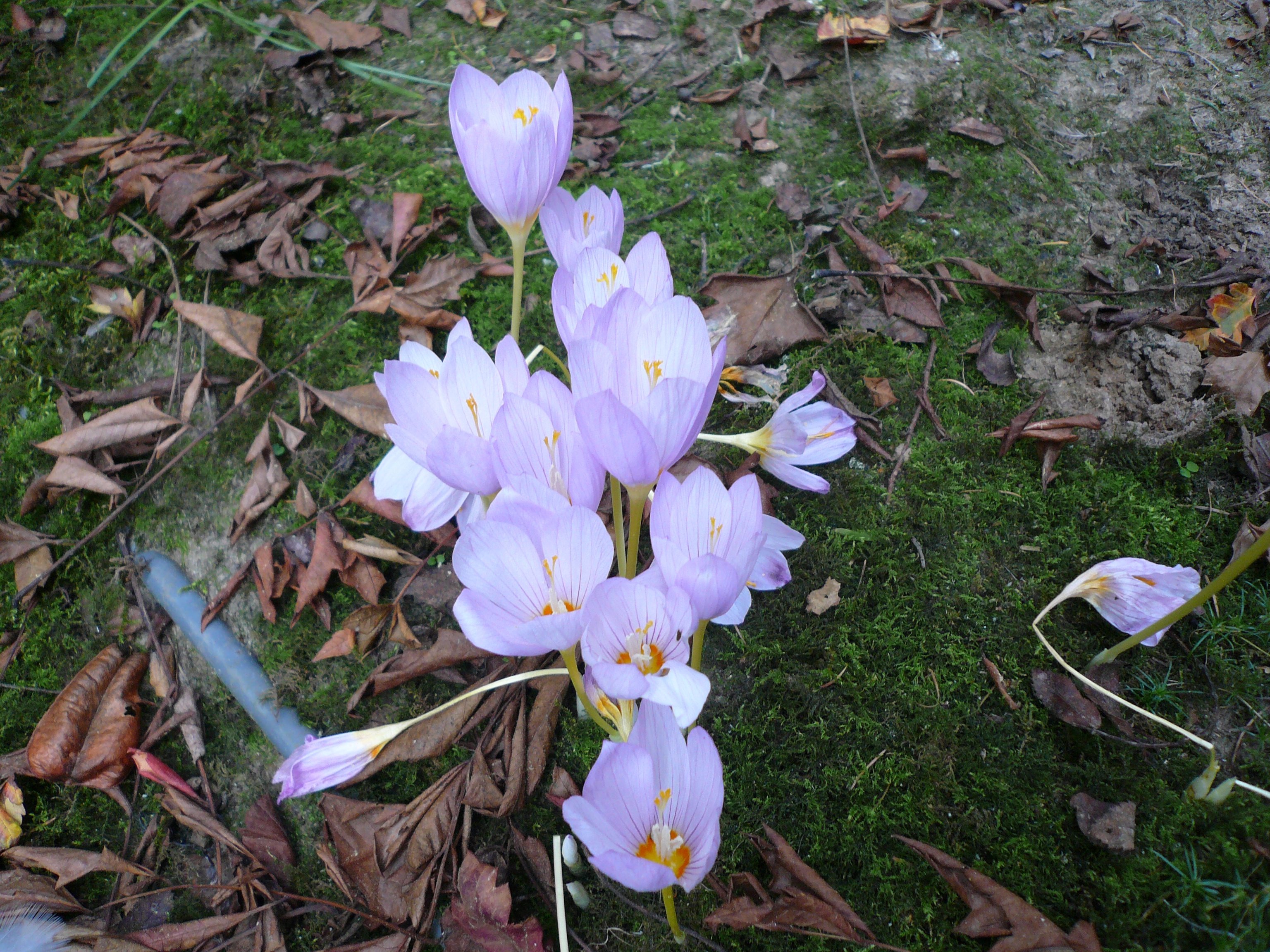 Crocus kotschyanus en culture